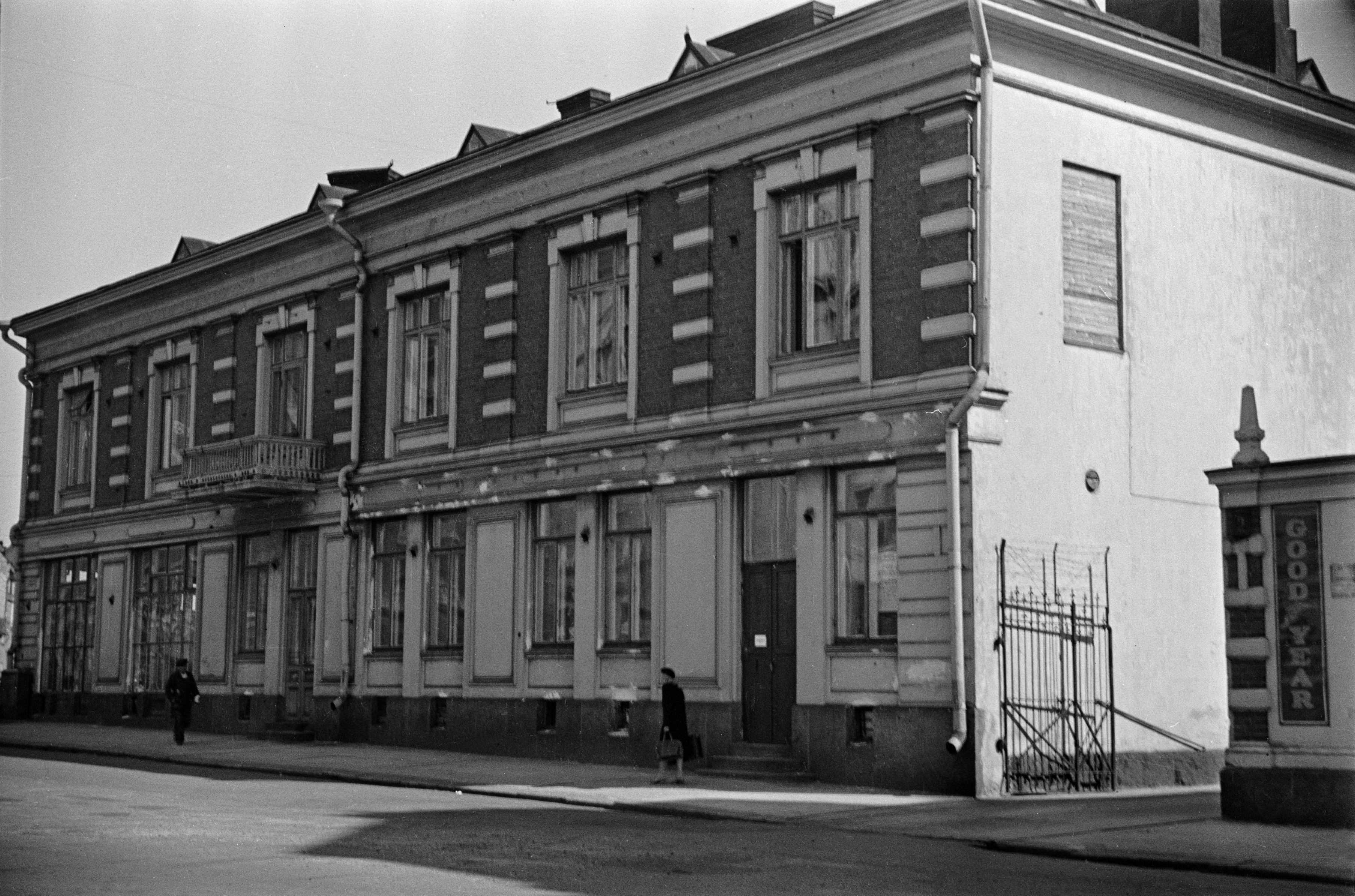 Suomen kommunistisen puolueen puoluetoimisto vuonna 1945 osoitteessa Säästöpankinranta 2, Helsinki.